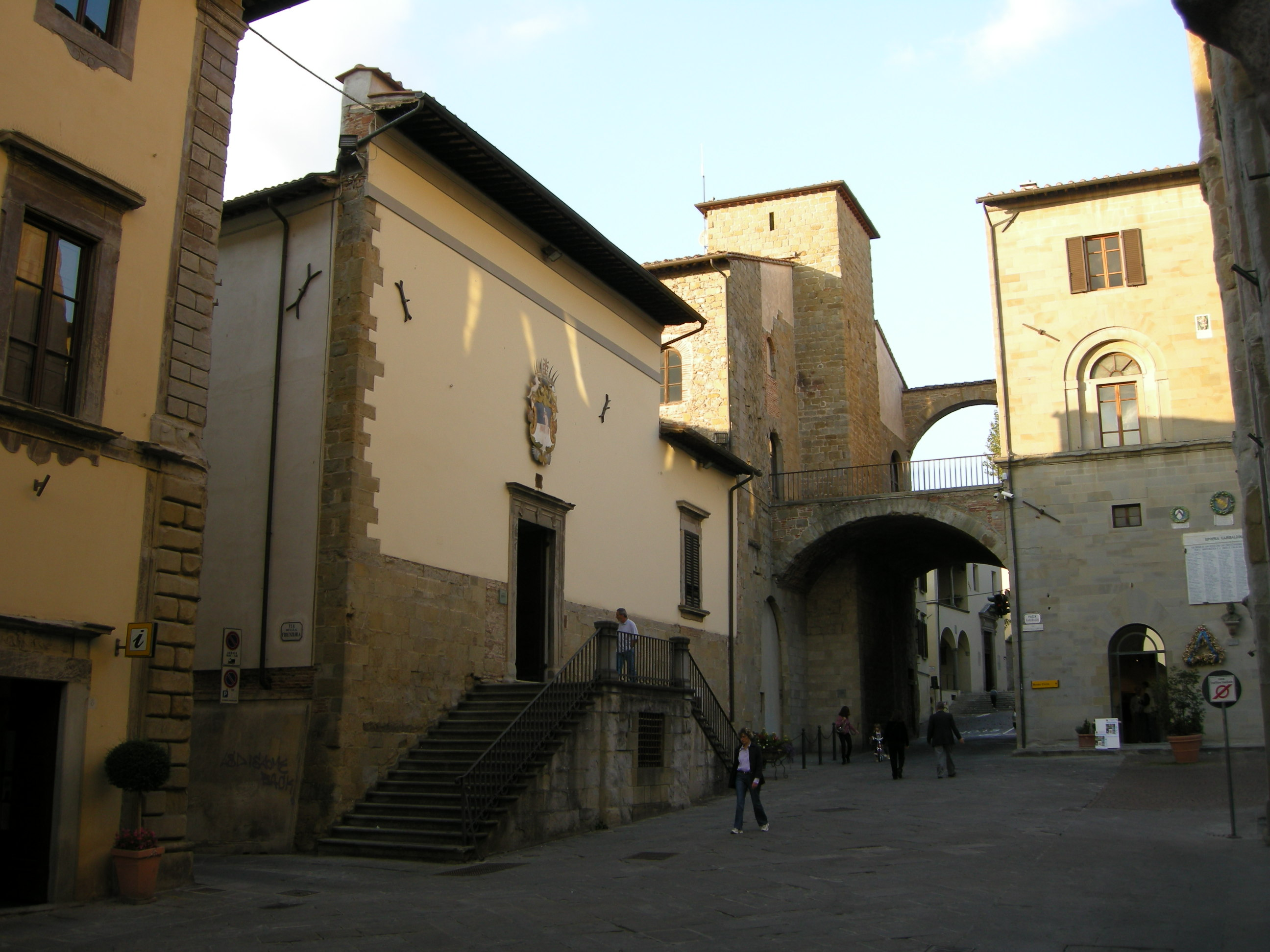 Sansepolcro, museo civico, esterno